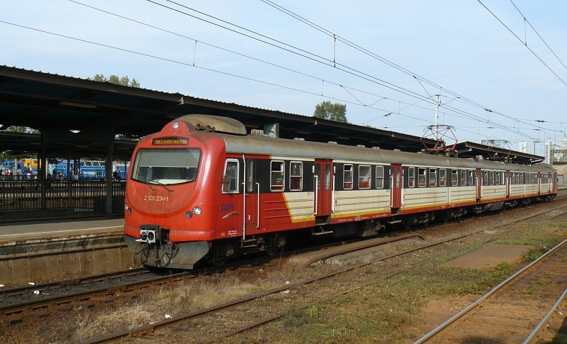 Elektryczny zespół trakcyjny EN57-3001 stoi na stacji Warszawa Zachodnia.